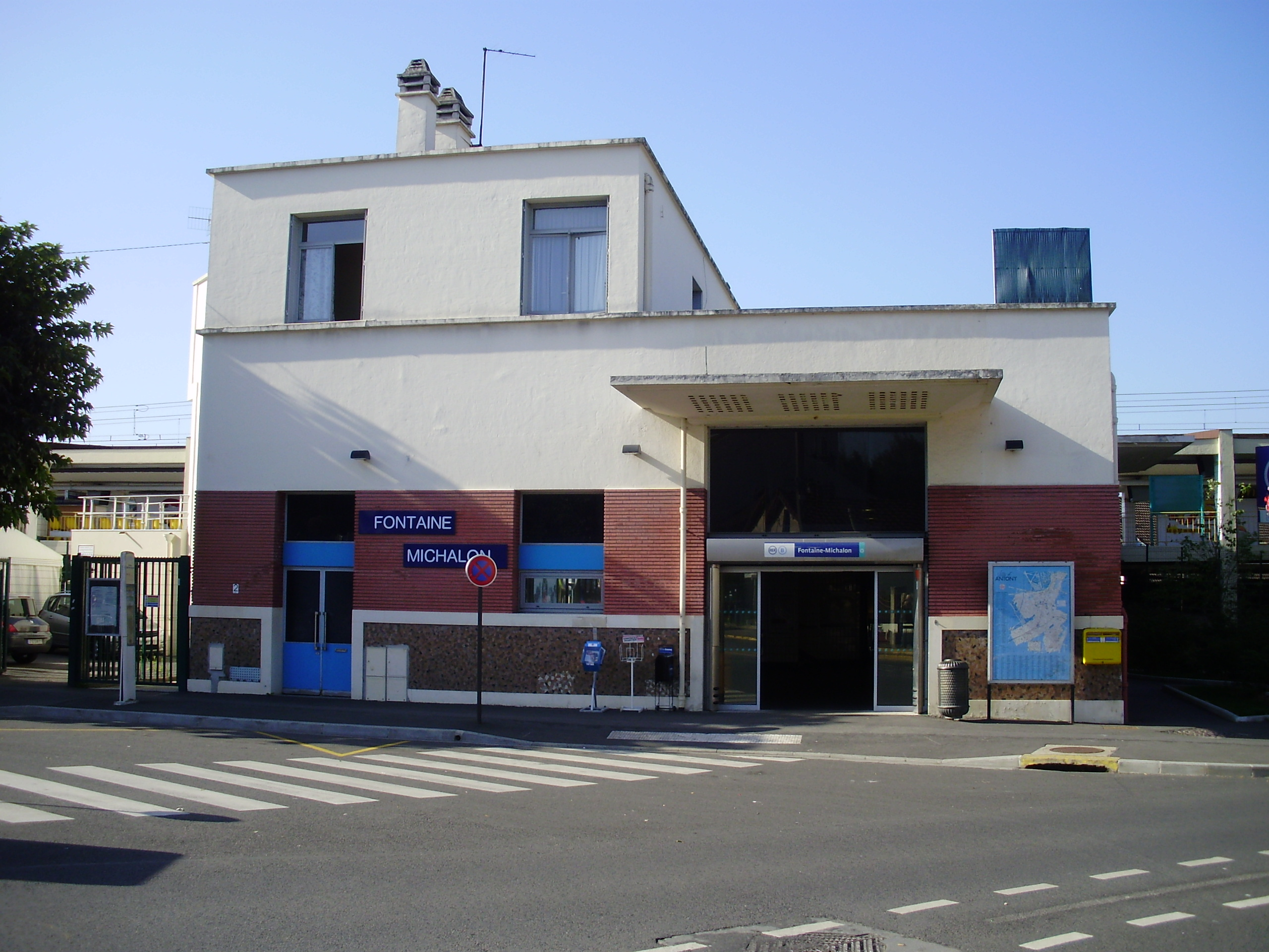 Gare de Fontaine Michalon, à Antony, Hauts-de-Seine, France (entrée principale, rue Mirabeau, au sud-est des voies)